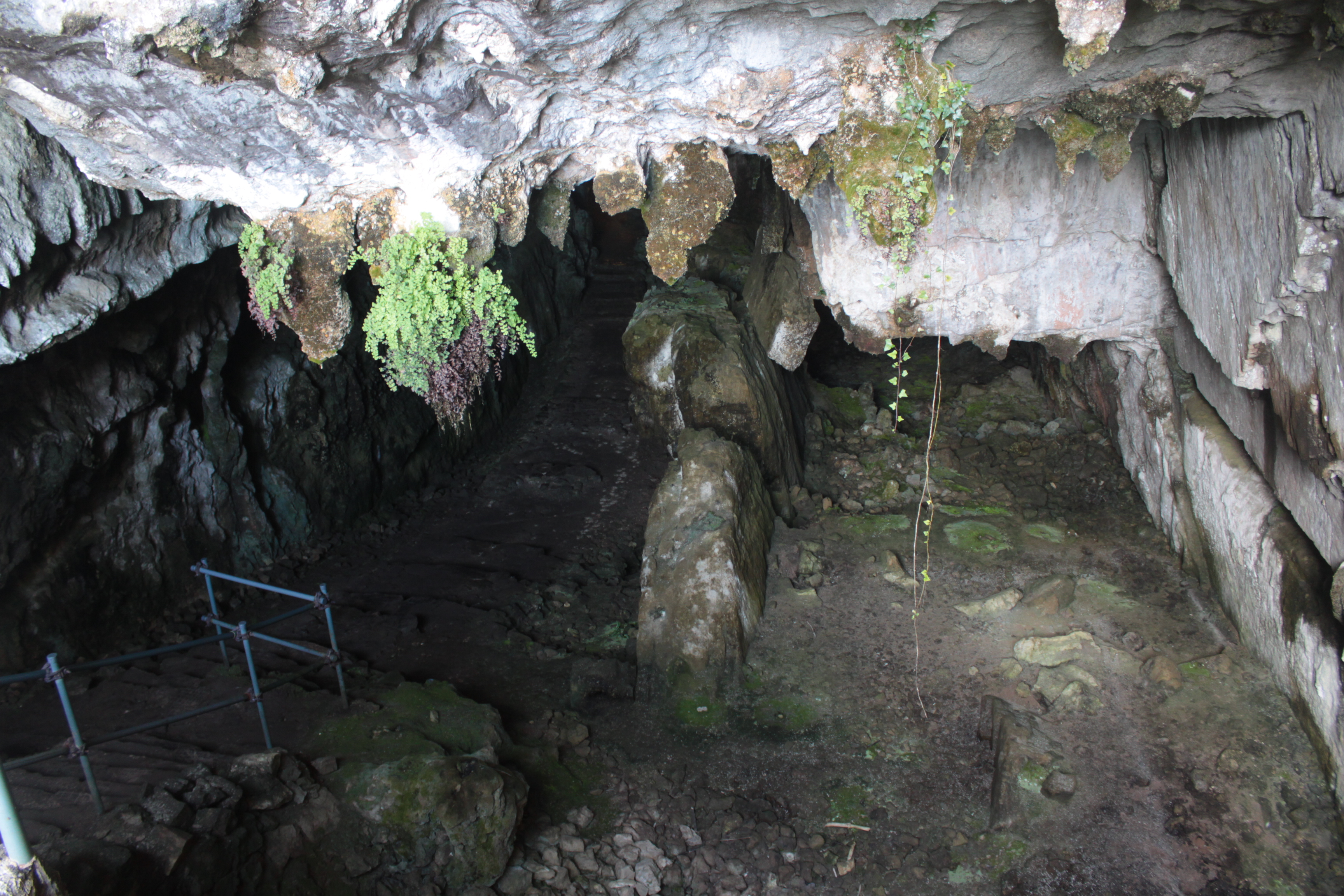 Interior de la cueva del Pindal, Pitiango, Ribadedeva, Asturias